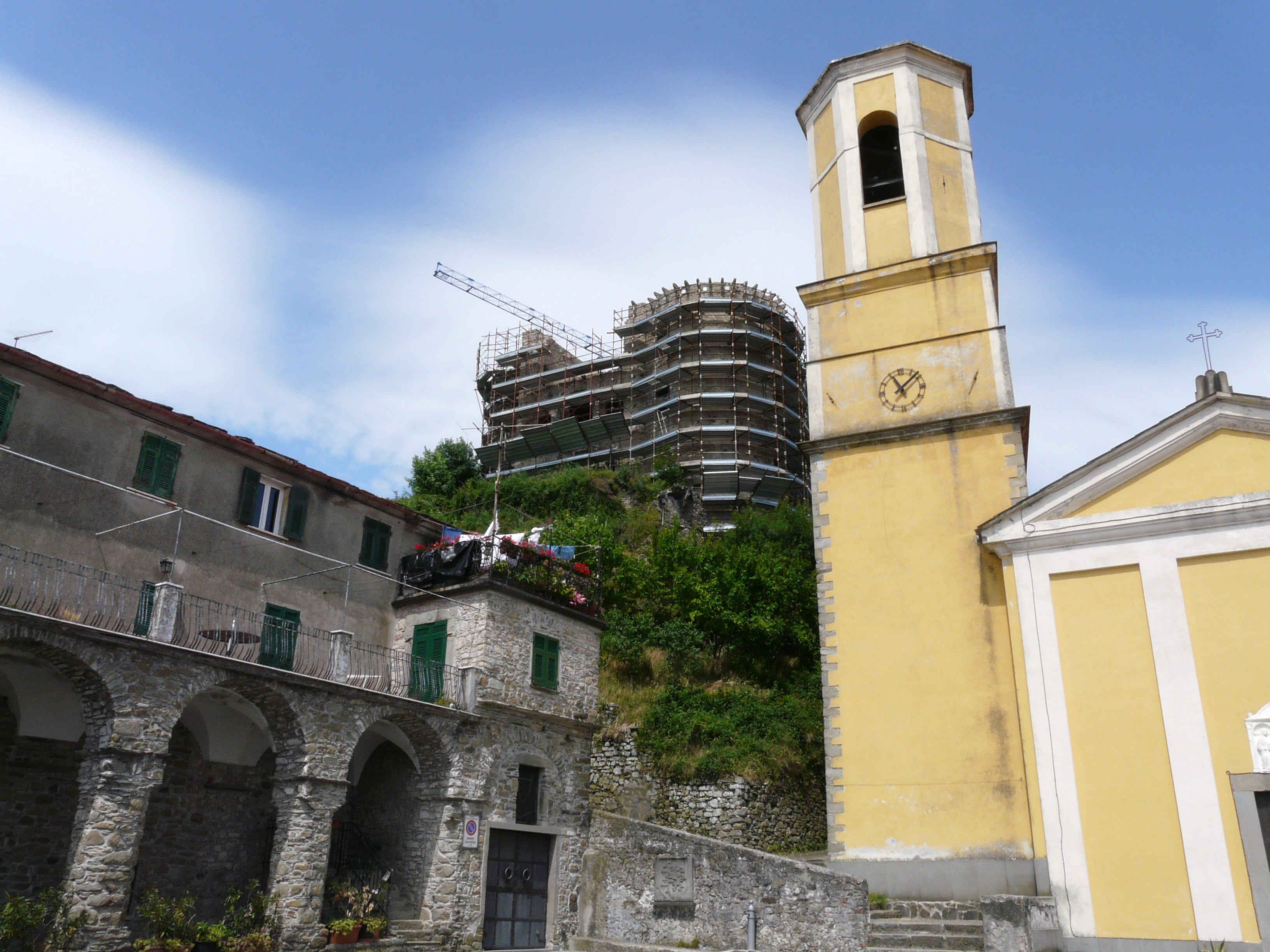 Centro storico di Madrignano, Calice al Cornoviglio, Liguria, Italia